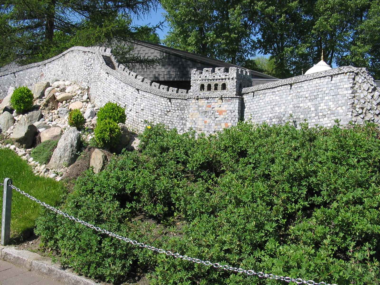 Chinese wall at Minimundus Klagenfurt